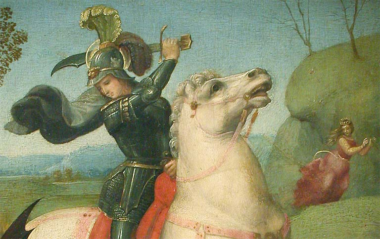 Raffaello, San giorgio e il drago